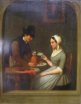 Charles Venneman (* 1802, † 1875): Männerservice